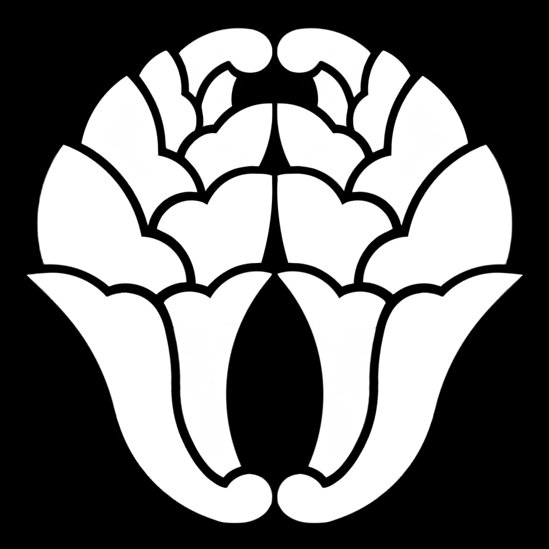 「杏葉」紋（染抜）